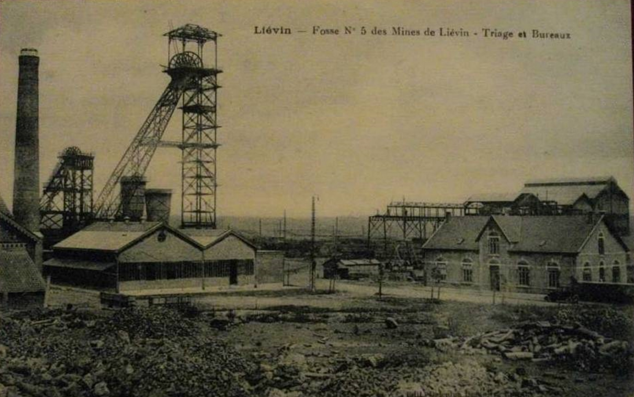 Fosse n° 5 - 5 bis de la Compagnie des mines de Liévin, Liévin, Pas-de-Calais, Nord-Pas-de-Calais, France.